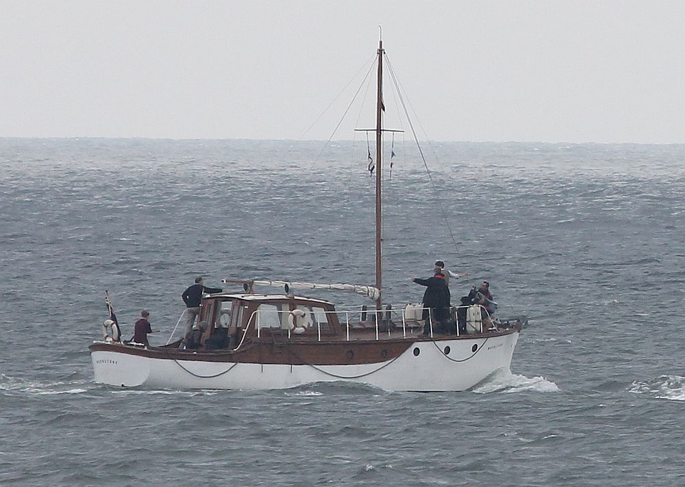 Le Moonstone, "Little Ship" au nom fictif, sur le tournage du film "Dunkirk", à Dunkerque, avec à son bord Christopher Nolan, Mark Rylance, Tom Glynn-Carney et Barry Keoghan.